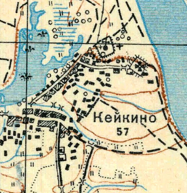 Топографическая карта Ленинградской области, квадрат О-35-21-Г-а (Орлы), деревня Кейкино.